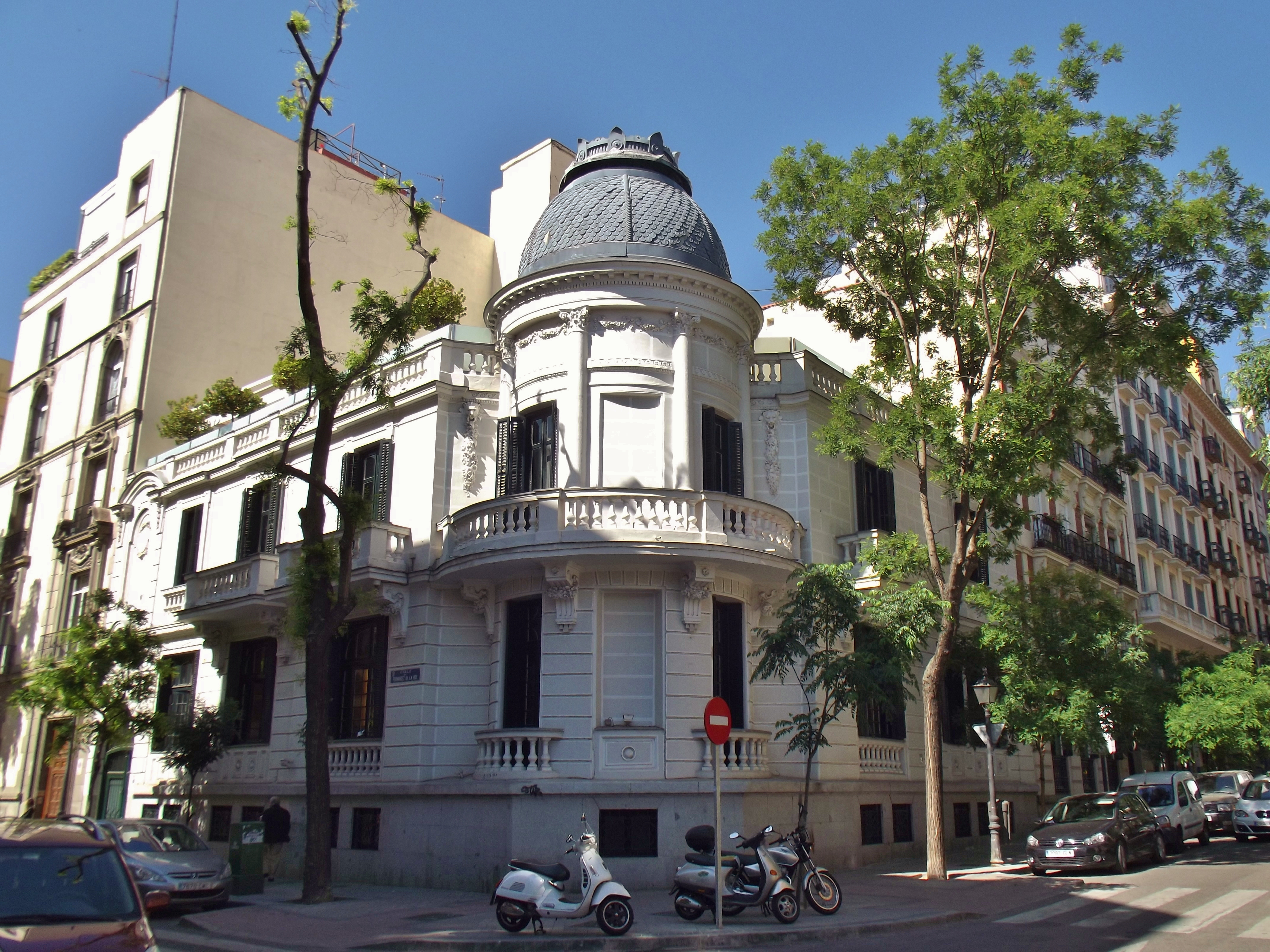 Esquina de la calle del General Arrando con la calle de Fernández de la Hoz, Chamberí, Madrid. Online database: COAM.